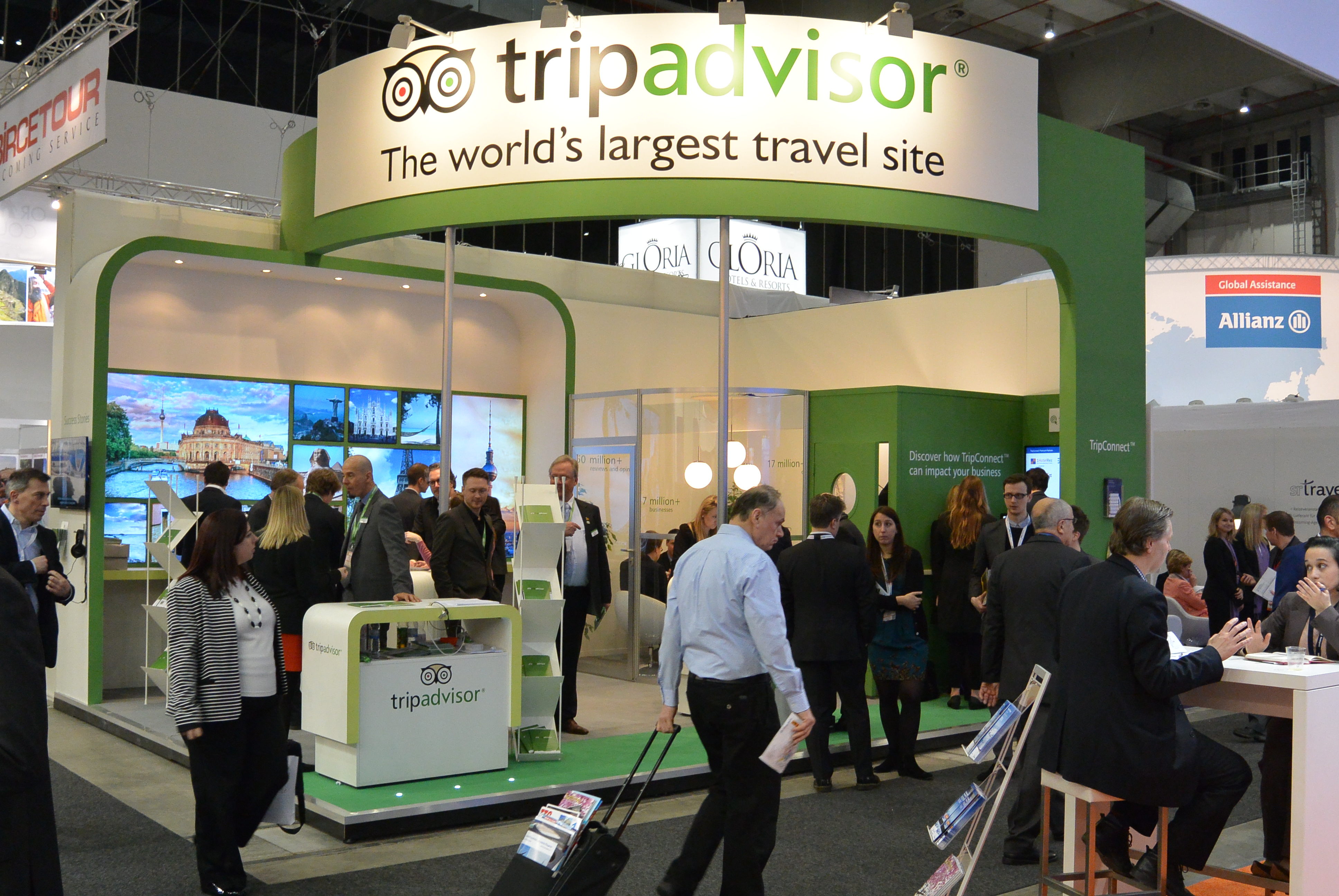 Stoisko portalu tripadvisor podczas ITB Berlin 2014.